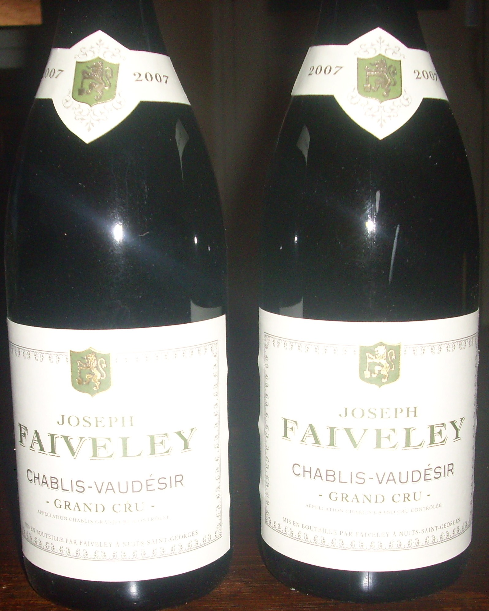 Bouteilles de Chablis Grand Cru Vaudésir 2007 (Faiveley)